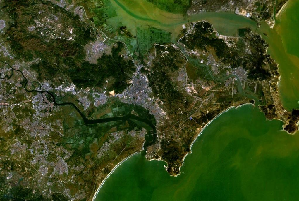 ChaoyangWWmap2010